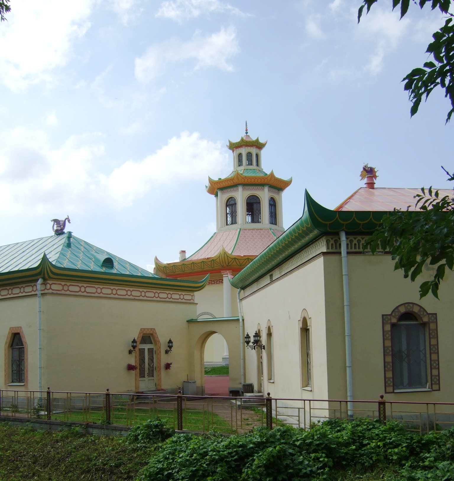 Chinese Village, Alexander Park, Tsarskoye Selo